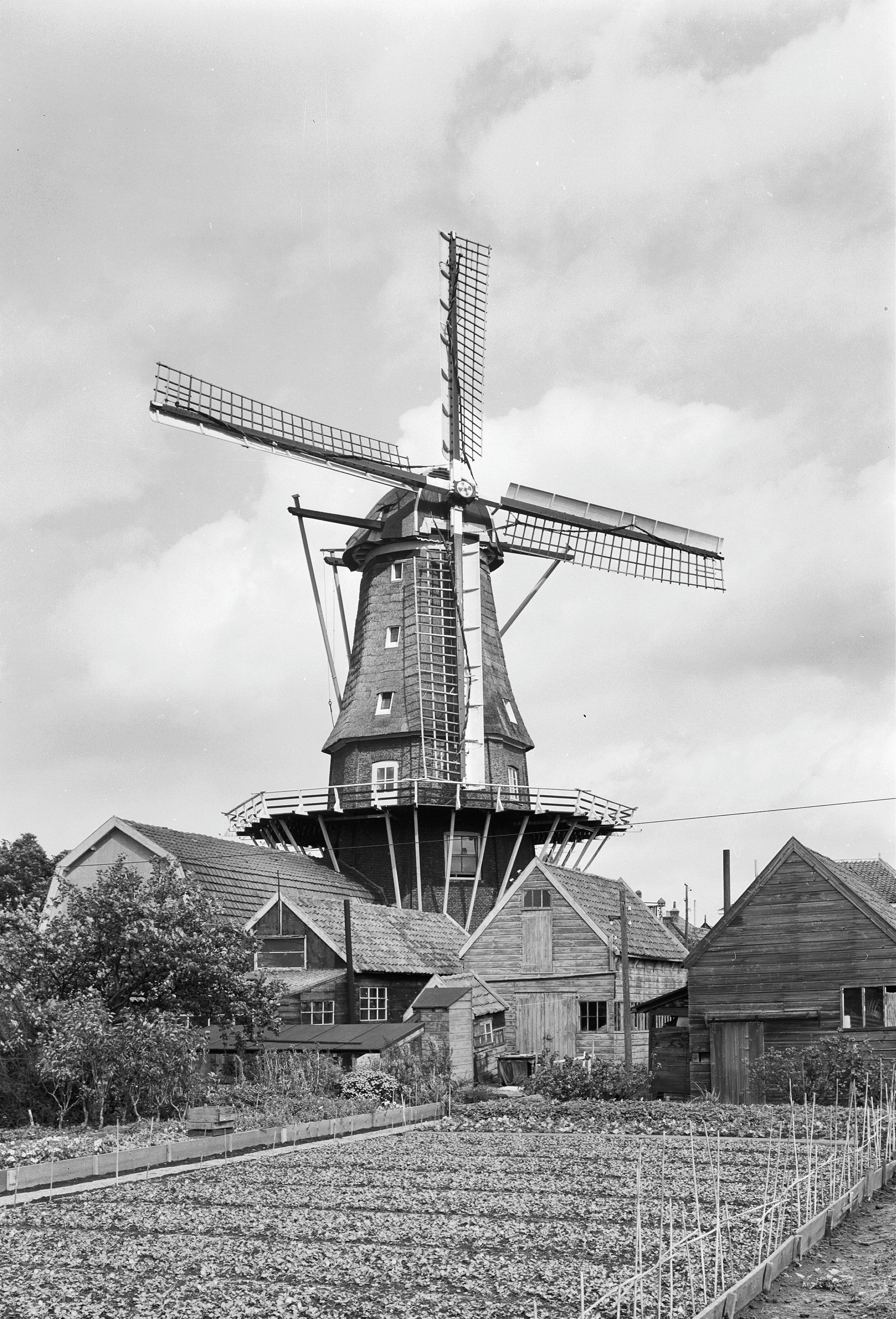 De Leeuw: Achtkante stellingmolen van voren gefotografeerd